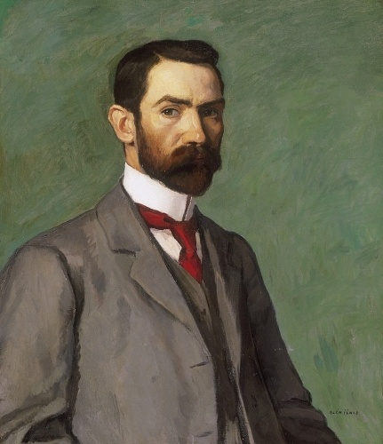 Self-portrait.